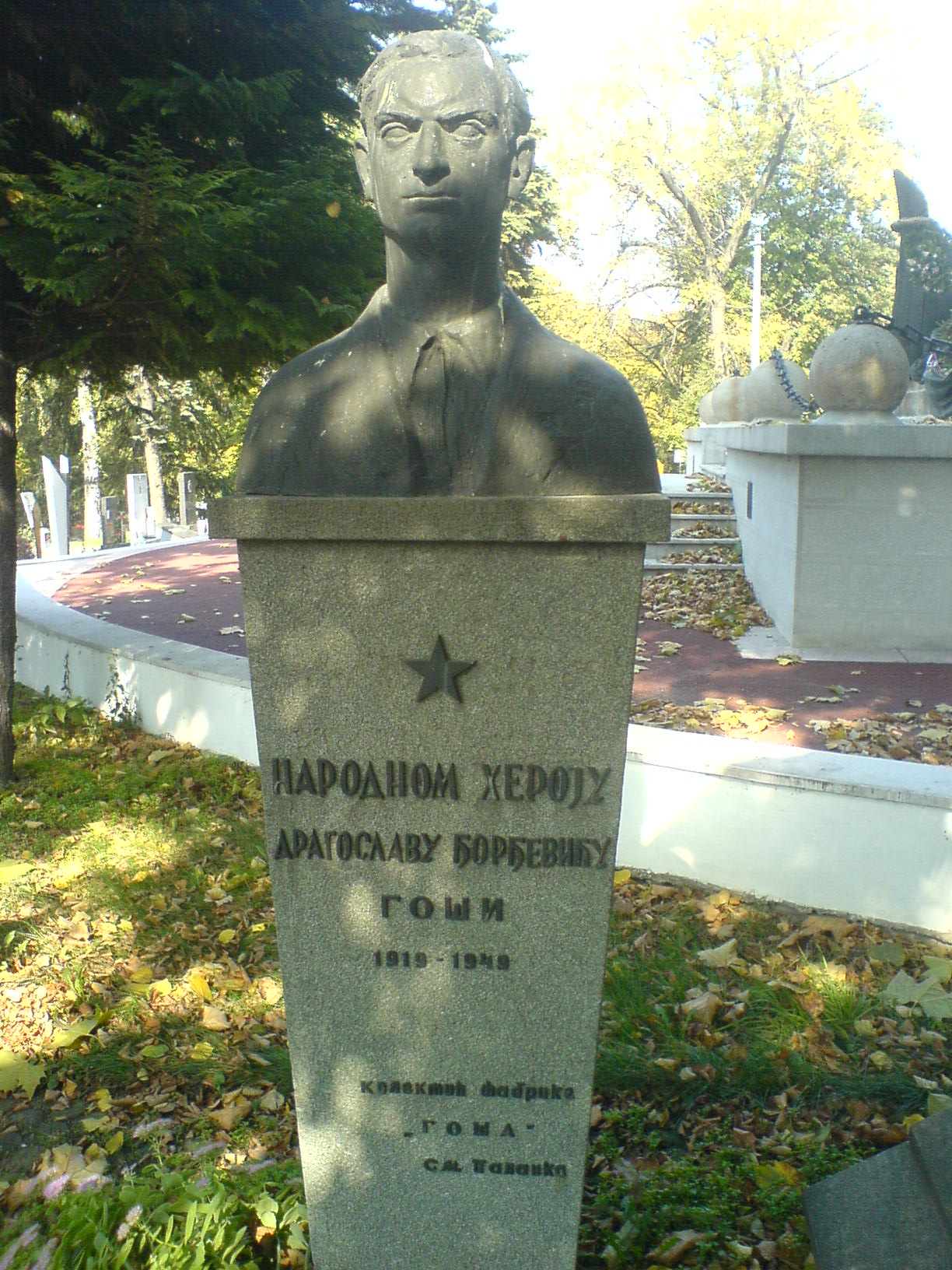 Grob Dragoslava Đorđevića Goše.